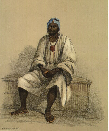 Mandingue du Bambouk (Illustration de Voyage dans l'Afrique occidentale, Anne Raffenel)